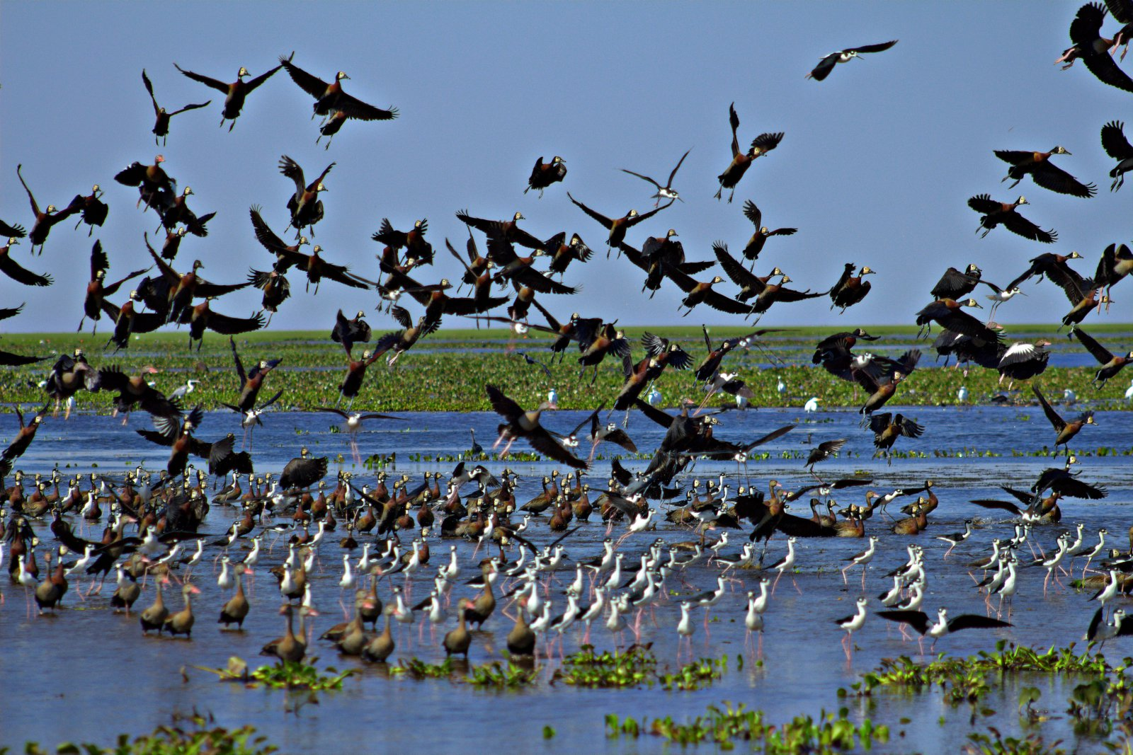 Yaguaso Cariblanco (Dendrocygna viduata), Güirirí (Dendrocygna autumnalis discolor), Viuda Patilarga (Himantopus mexicanus mexicanus) y otras.